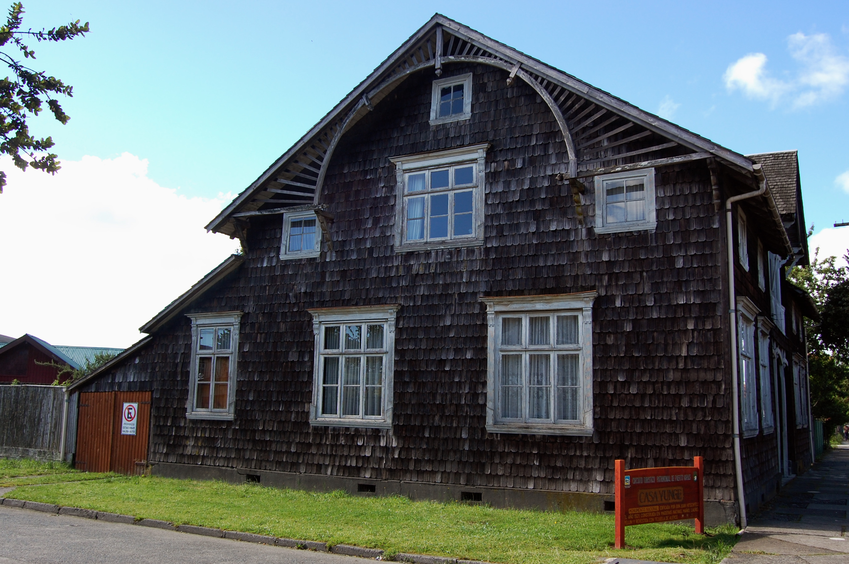 Casa Yunge, fachada lateral This is a photo of a national monument in Chile: 727